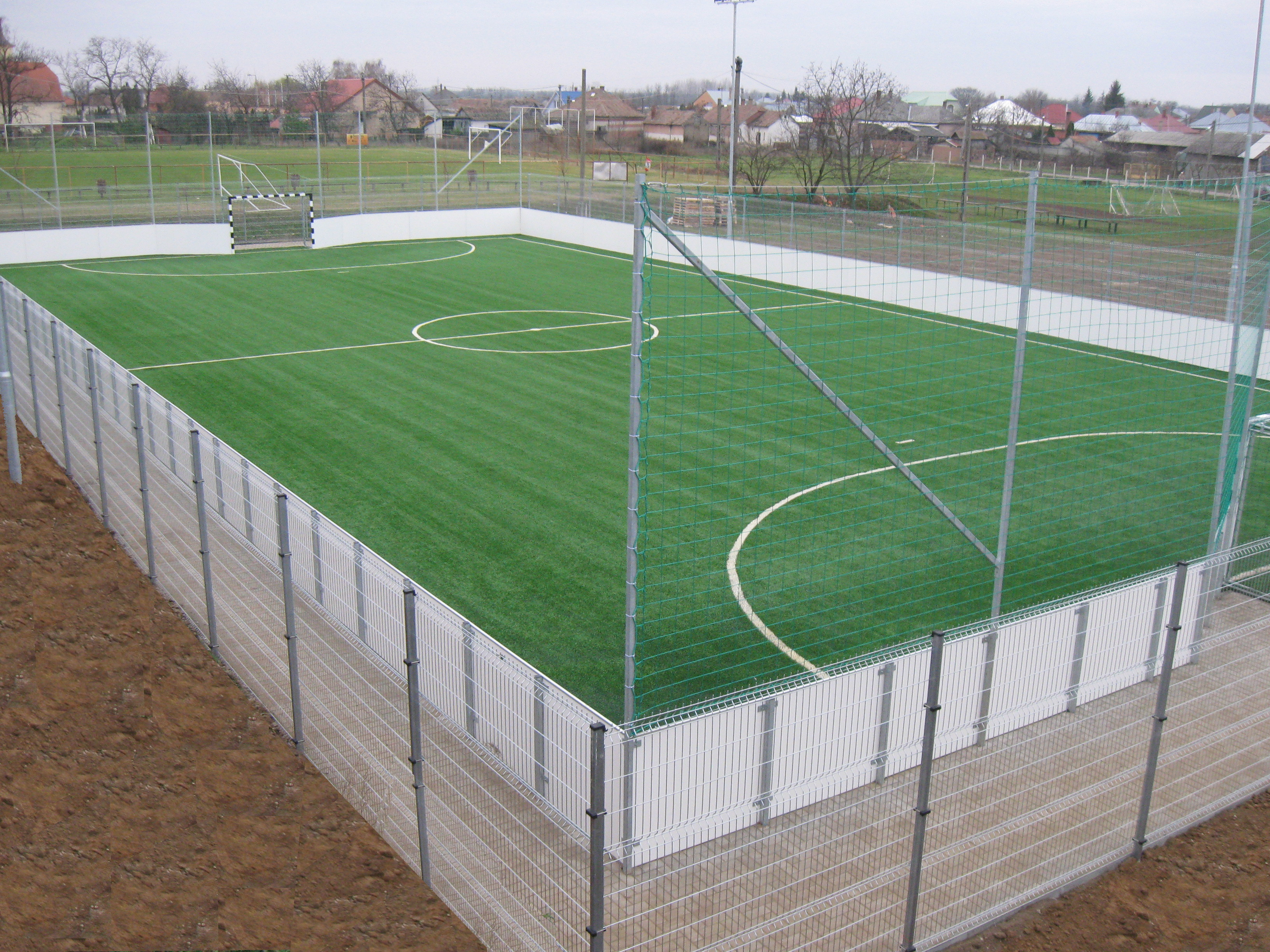 Szakolyban megépült 20x40 méter méretű focipálya (Szakoly, Szabolcs-Szatmár-Bereg megye)